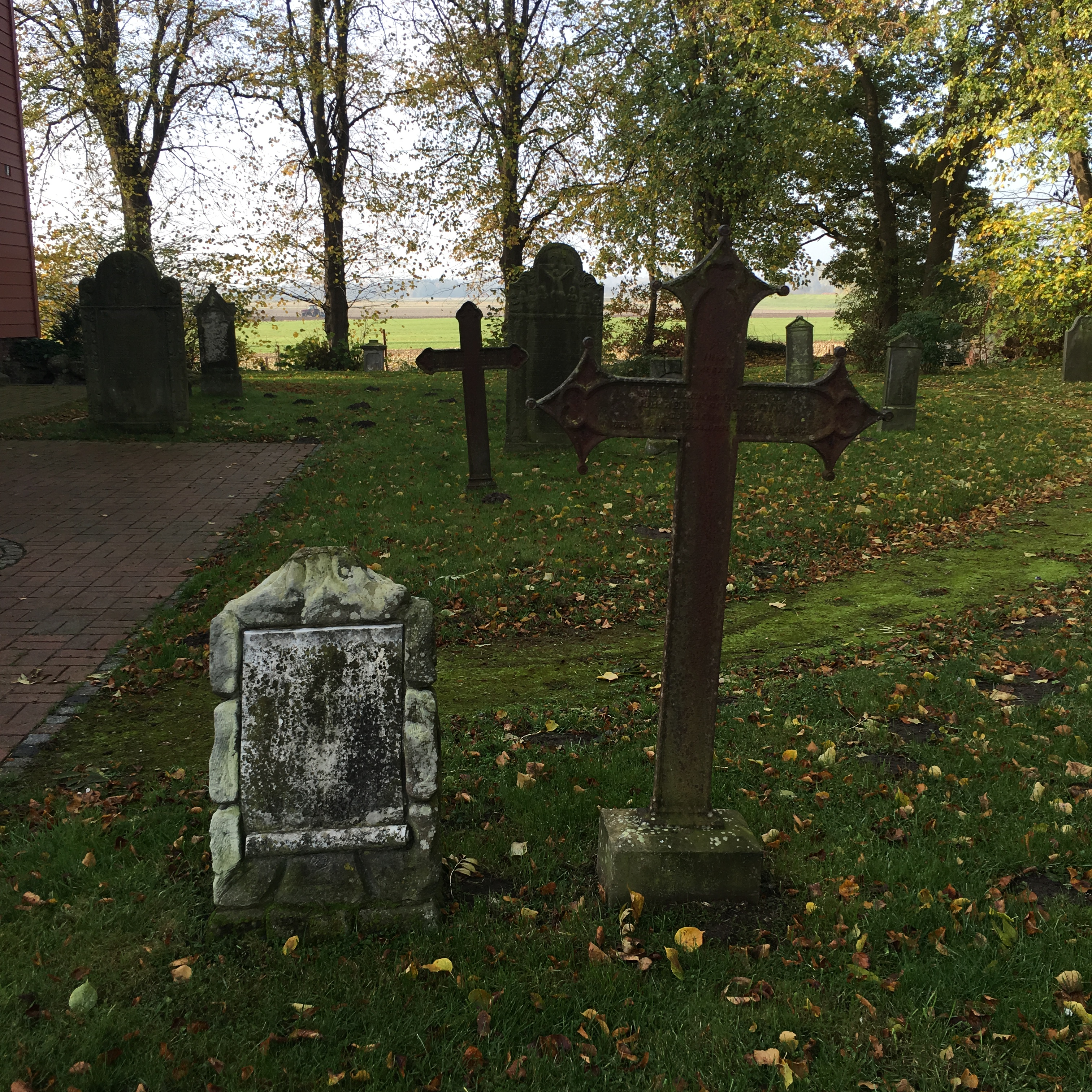 Graffsteen bi de Kark op de Host bi Burweg